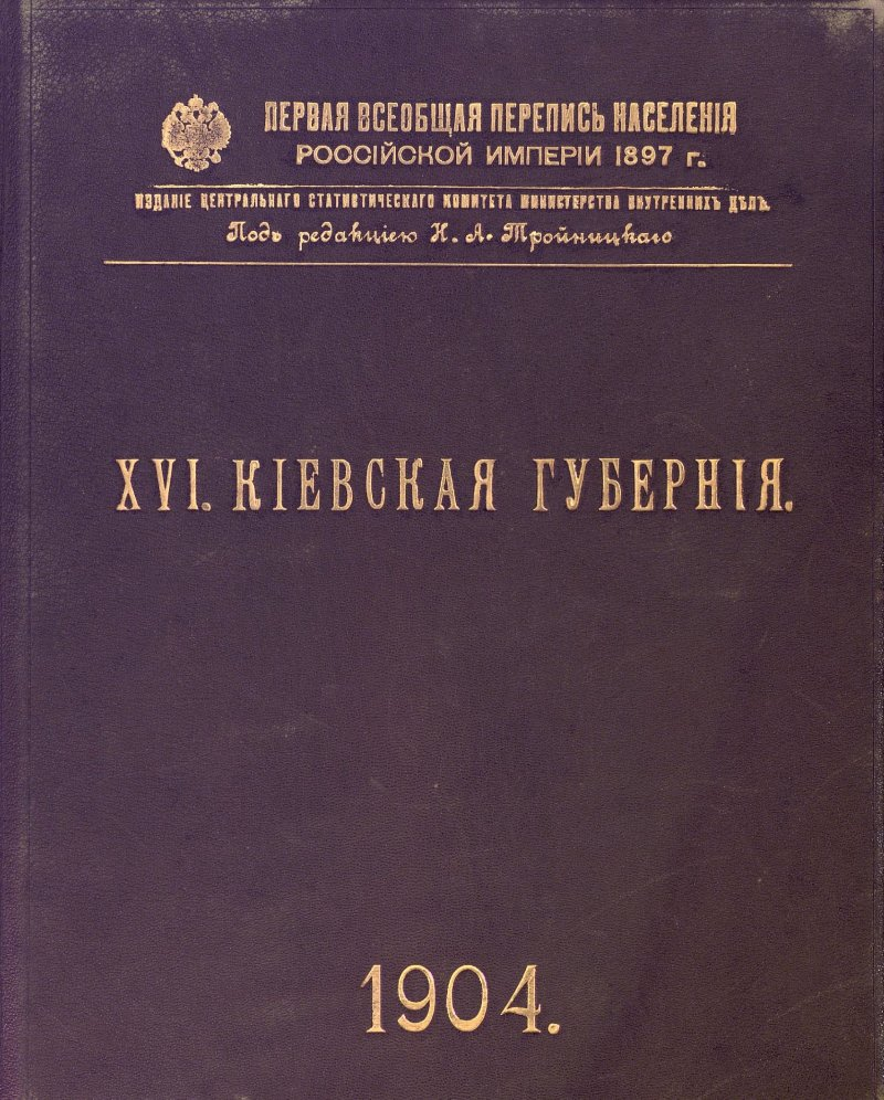 Перепис населення Російської імперії 1897 — Київська губернія. Обкладинка видання центрального статистичного комітету міністерства внутрішніх справ під редакцією М.А. Тройницького